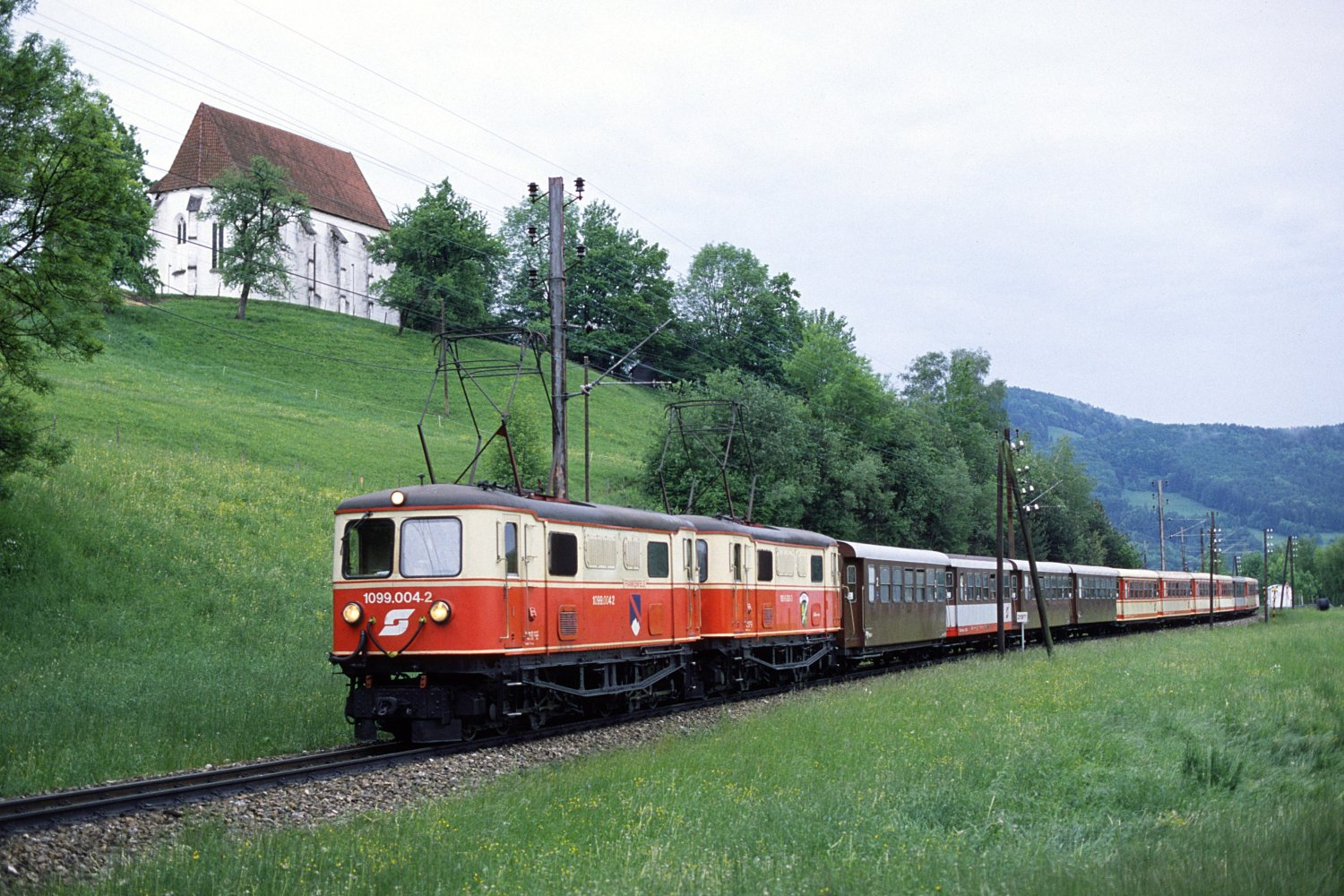 de: Wallfahrer-Sonderzug der Mariazellerbahn bei Kirchberg an der Pielach, Niederösterreich. Der talauswärts fahrende Zug in Richtung St. Pölten passiert die Andreaskirche. en: A pilgrim's special train on the Mariazellerbahn passing the Saint Andrew's church near Kirchberg an der Pielach in Lower Austria, the train is bound for St. Pölten